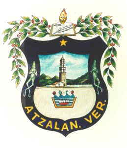 Escudo del municipio de Atzalan